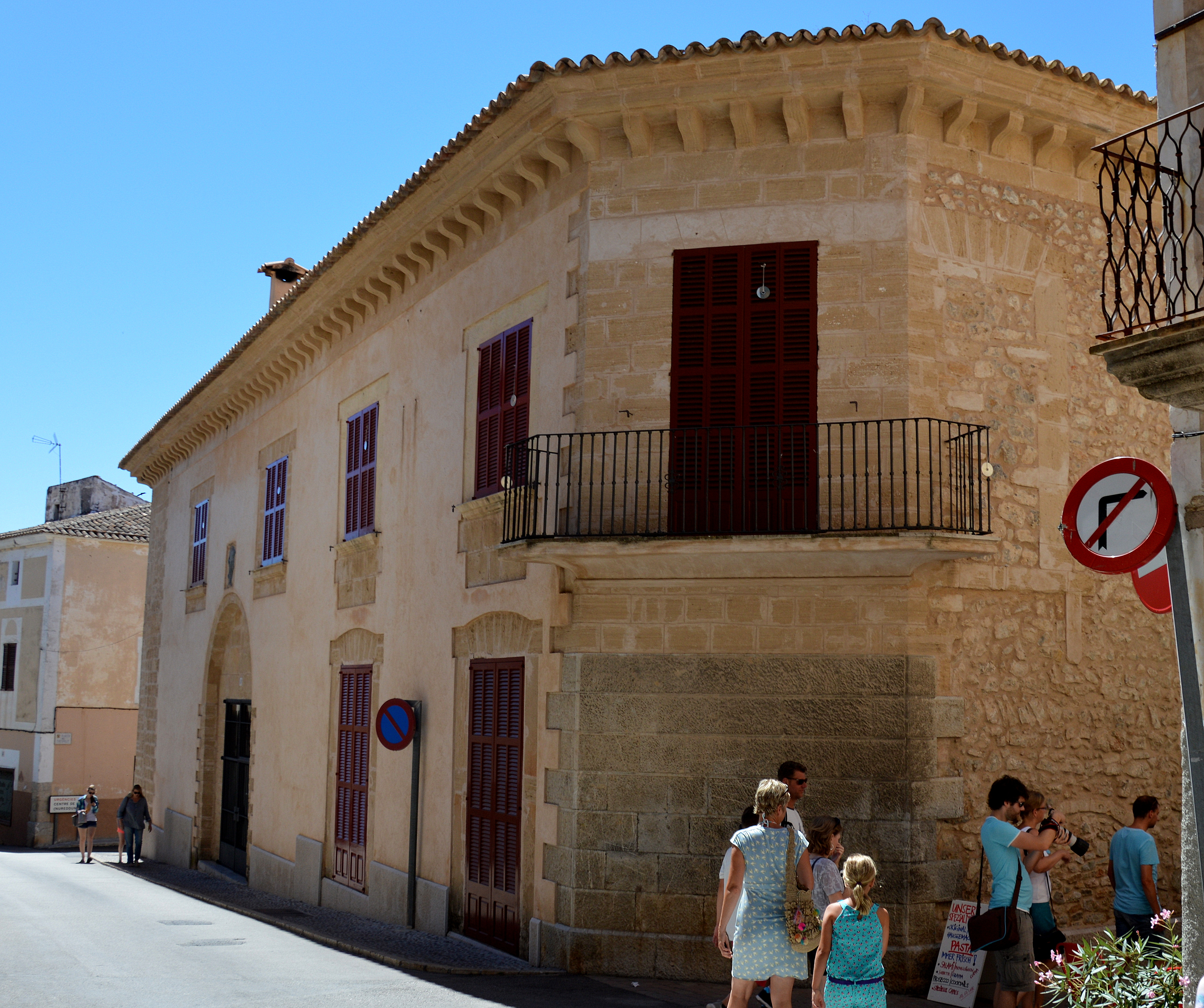 Haus Cal Marques in Arta